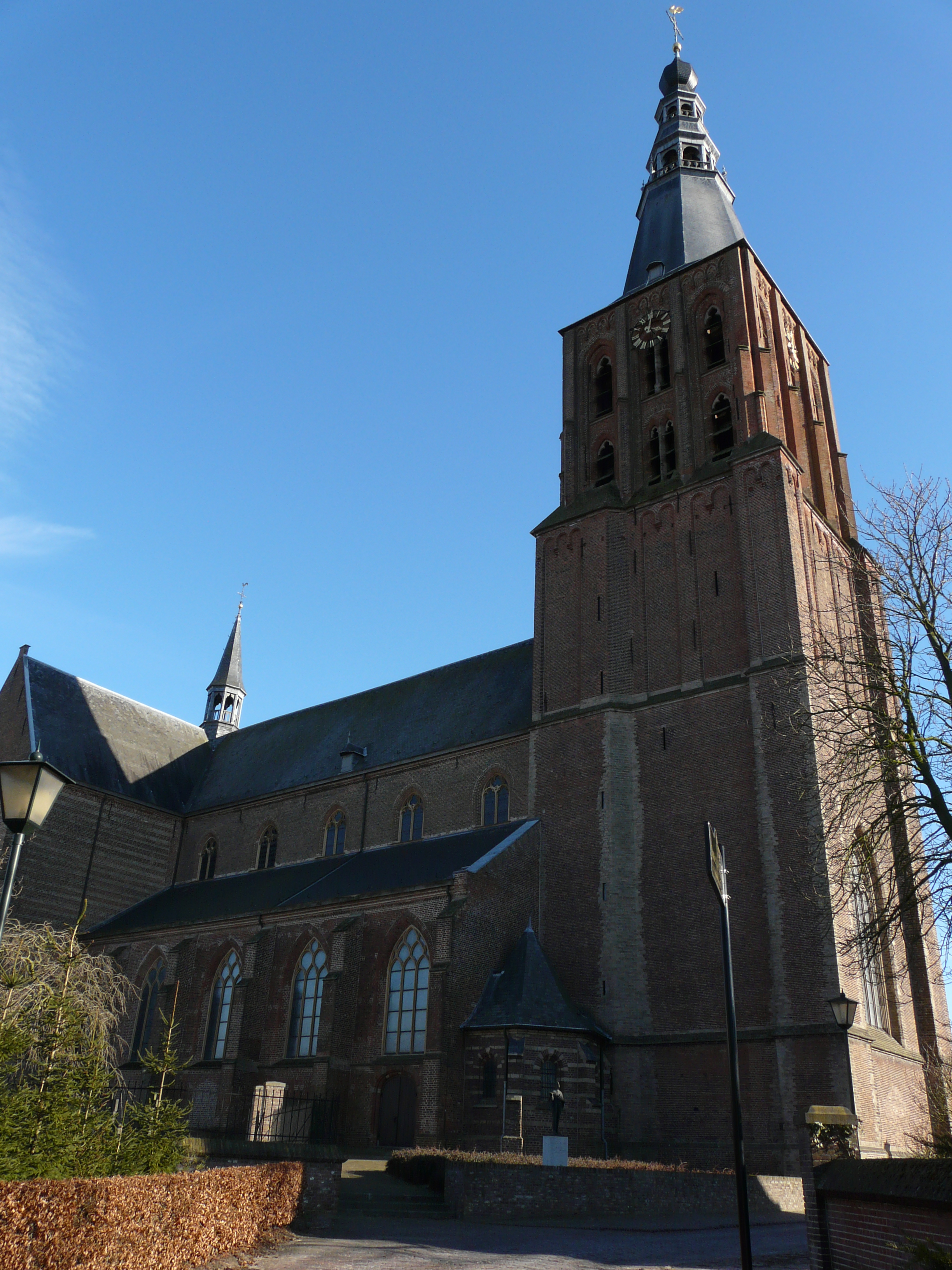 Sint-Petruskerk in Boxtel